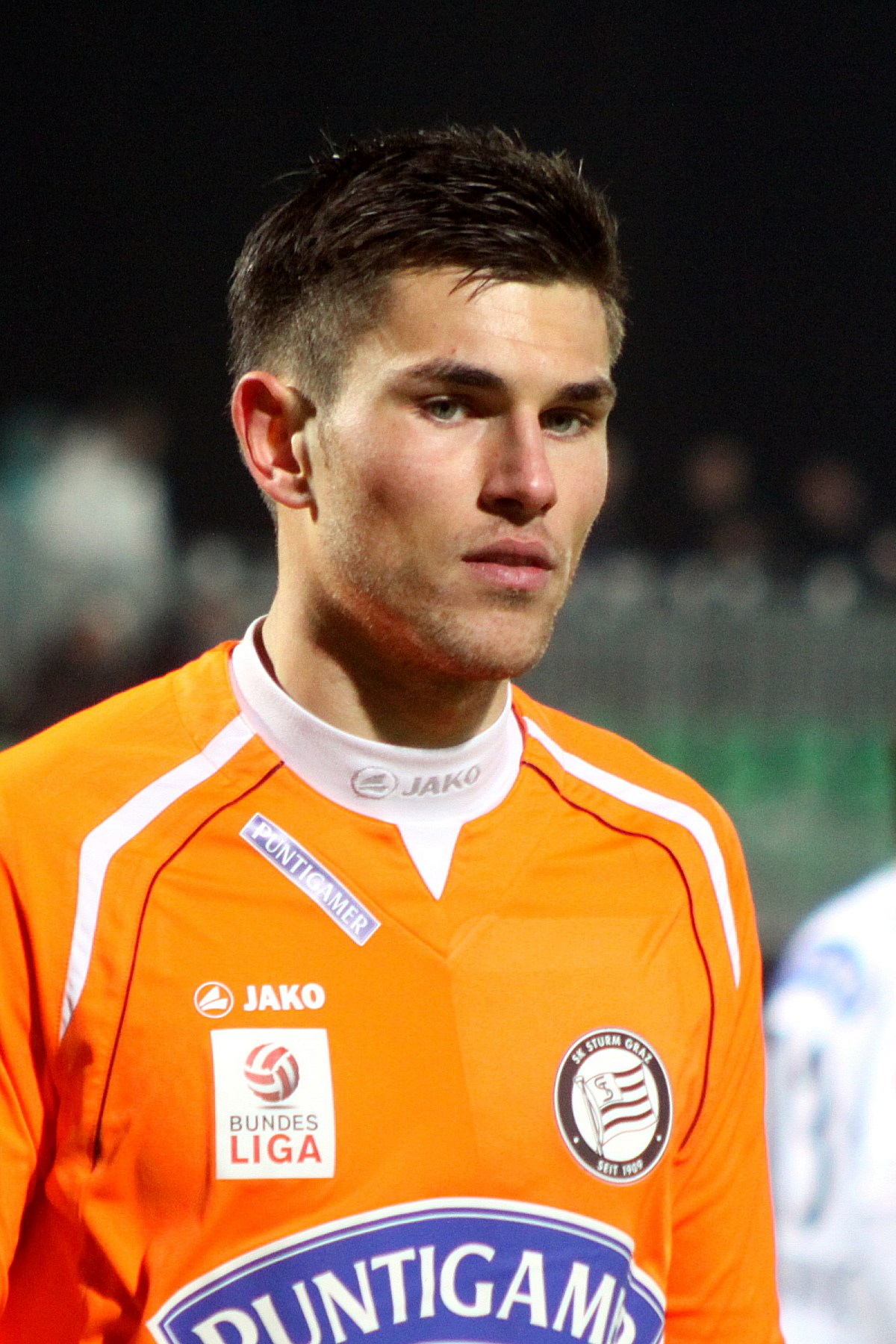 Meisterschaftsspiel SV Mattersburg (grüne Trikots) gegen SK Sturm Graz (weiße Trikots). – Das Bild zeigt: Johannes Focher (SK Sturm Graz). Object location47° 44′ 21.67″ N, 16° 24′ 23.15″ E